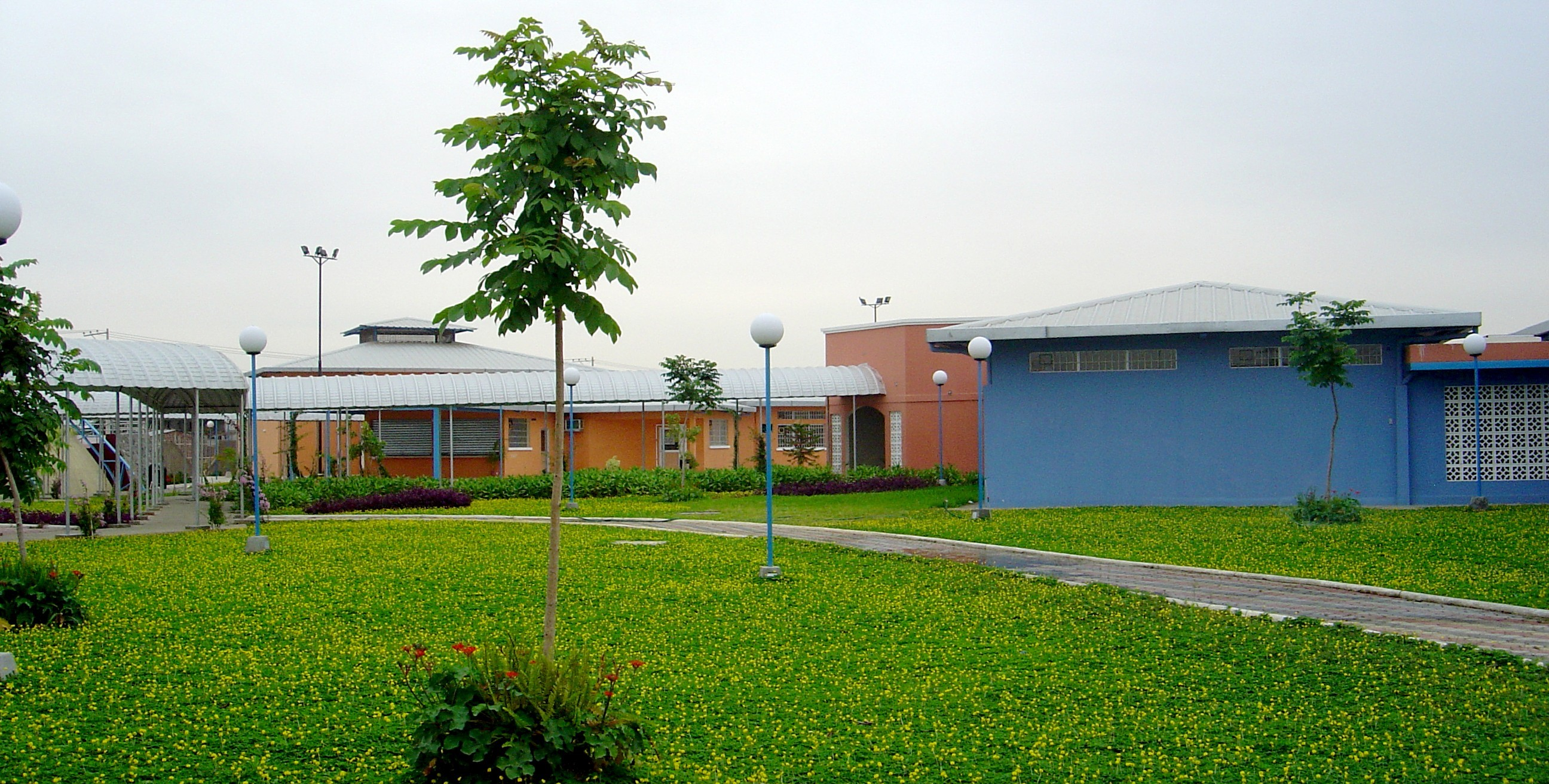 Centro Polifuncional Autor: Zumar-Alfredobi Lugar: Bastión Popular - Guayaquil Fecha: Julio 2005)